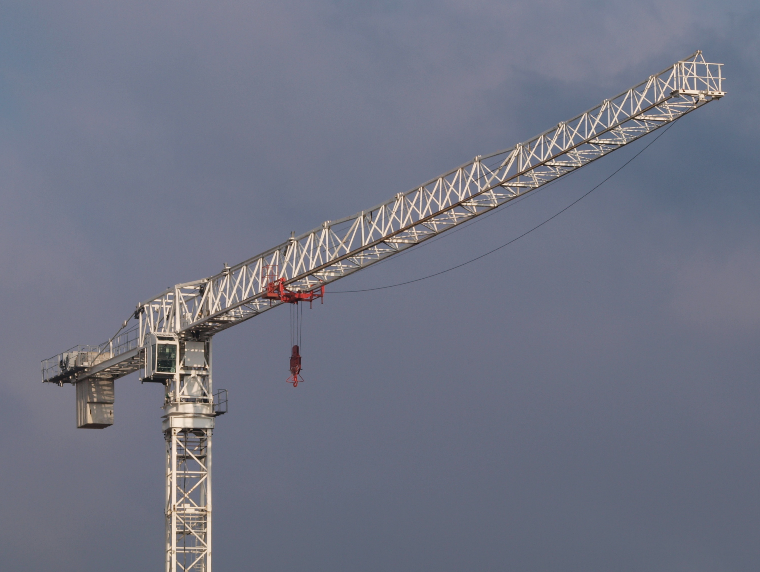 Tower crane, Amsterdam 2011